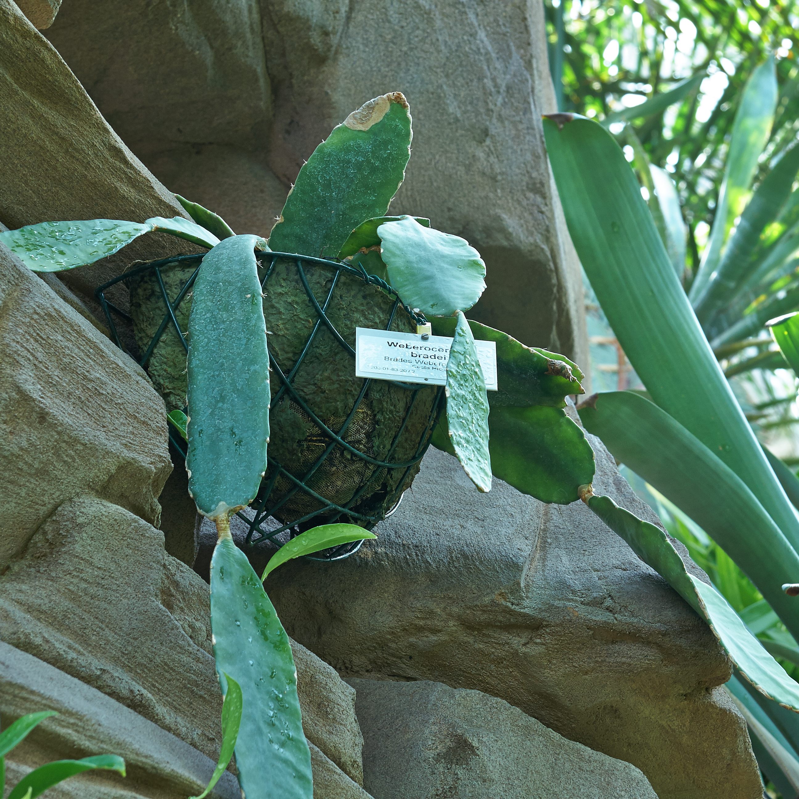 Weberocereus bradei identifierad med hjälp av befintlig skylt i Botanischer Garten Berlin.